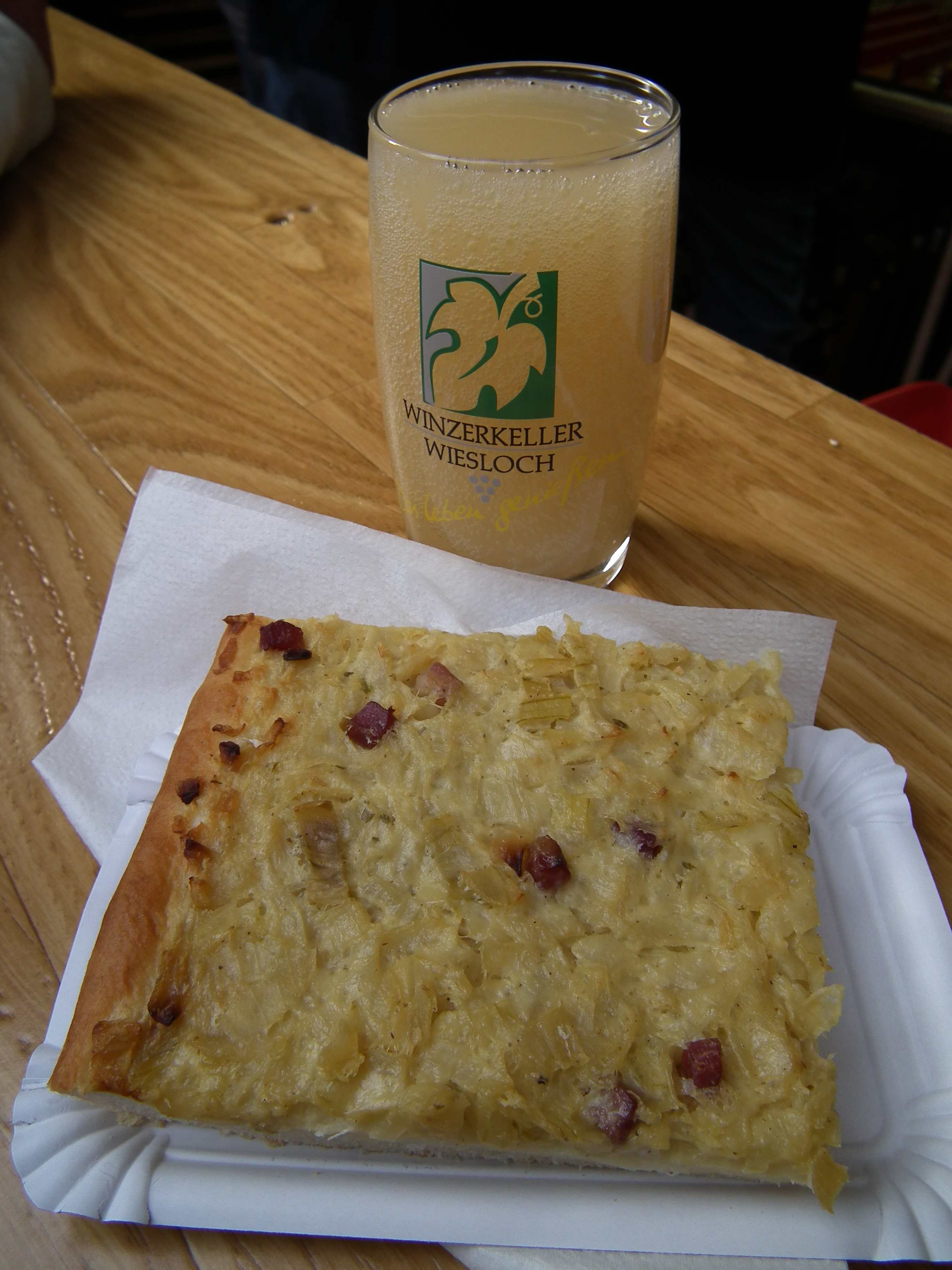 Traditioneller Zwiebelkuchen und ein Glas Federweisser, fotografiert in Nordbaden (Deutschland)